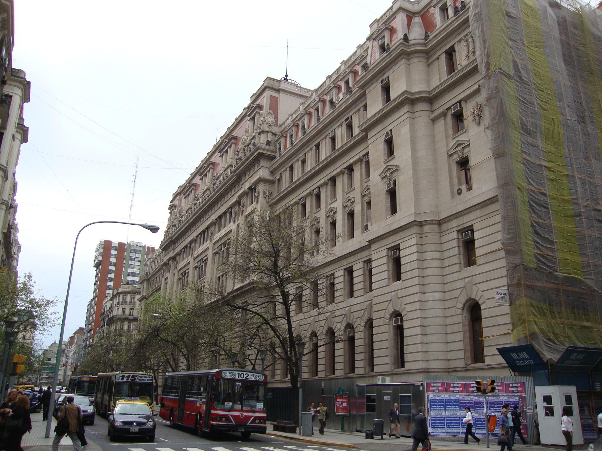 Fachada del Palacio de Justicia hacia la calle Uruguay. A la derecha, parte de la fachada lateral hacia la calle Lavalle, durante los trabajos de restauración. Buenos Aires, Argentina.